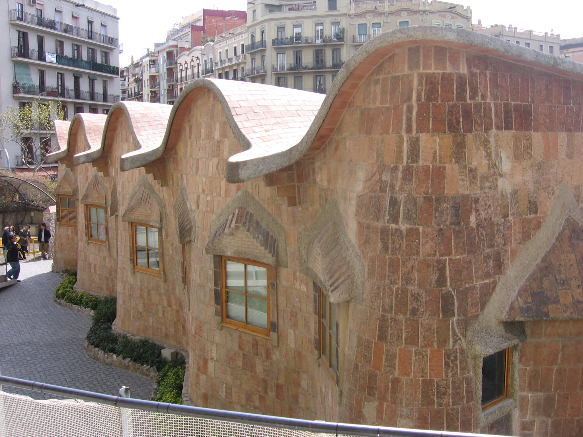 Escuelas de la Sagrada Familia